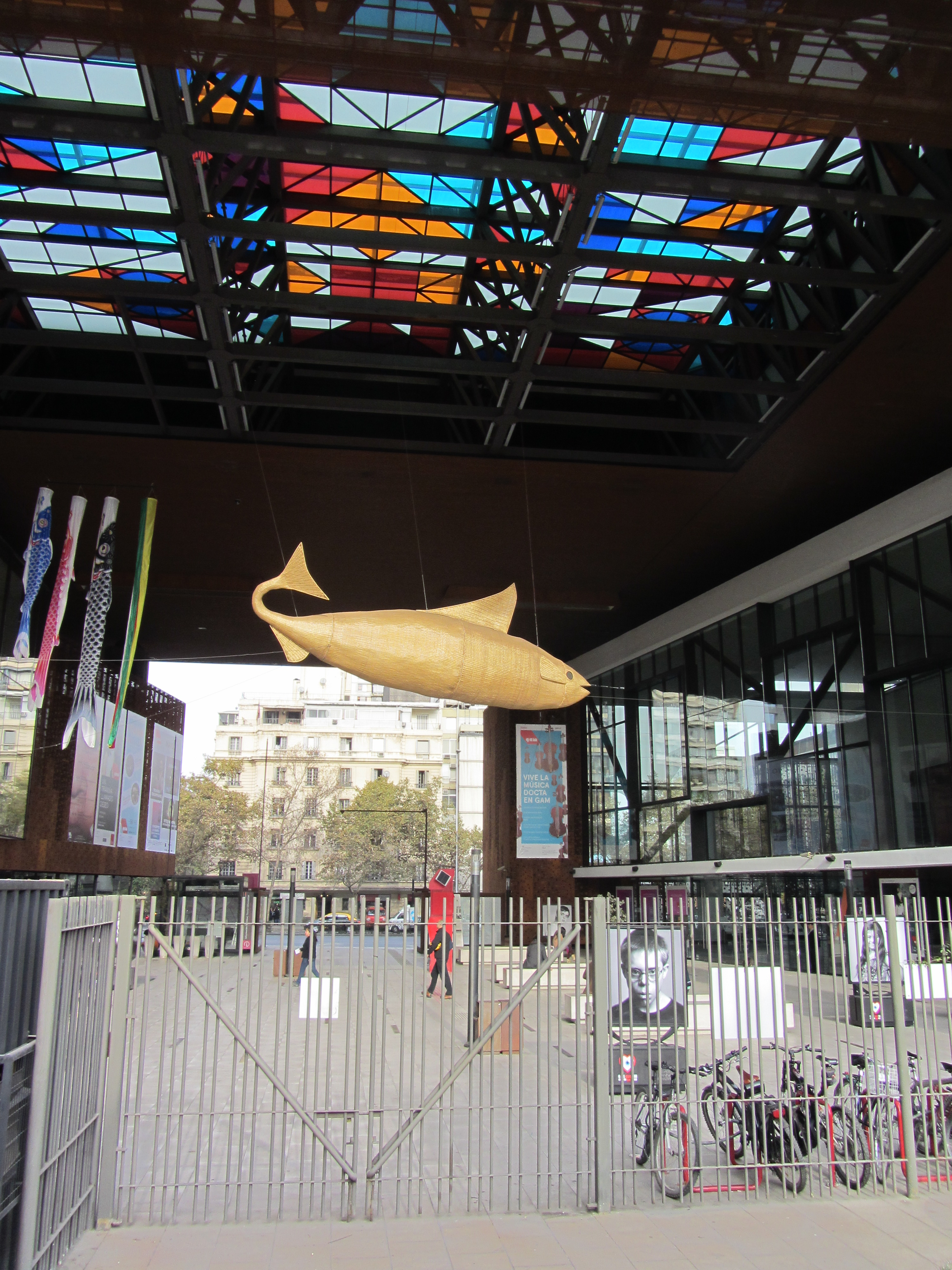 Pez de mimbre, réplica del original de 1972 de Alfredo Manzano, y Volantín, vitral de acrílico, obra de 1972 de Juan Bernal Ponce, reconstruida después del incendio de 2006; están en la plaza central del Centro Cultural Gabriela Mistral, Santiago de Chile. El edificio UNCTAD III tenía una serie de obras artísticas incorporadas, como los peces de mimbre del artesano Manzanito (Luis Manzano Cabello, 1906-1984), que colgaban del casino (comedor) o el mural de Bernal. Después del golpe de Estado que en septiembre de 1973 derrocó al gobierno del socialista Salvador Allende, el complejo se convirtió en sede de la Junta Militar encabezada por el general Augusto Pinochet y muchas de las obras fueron retiradas y algunas se perdieron. En 2010 se recuperaron unas y otras fueron rehechas. La réplica del pez es un tejido de mimbre blanco sobre estructura metálica de 180 kg. de 9,9 m de largo y 1,85 m de diámetro y fue encargada al artesano de Chimbarongo Julio Rodríguez.